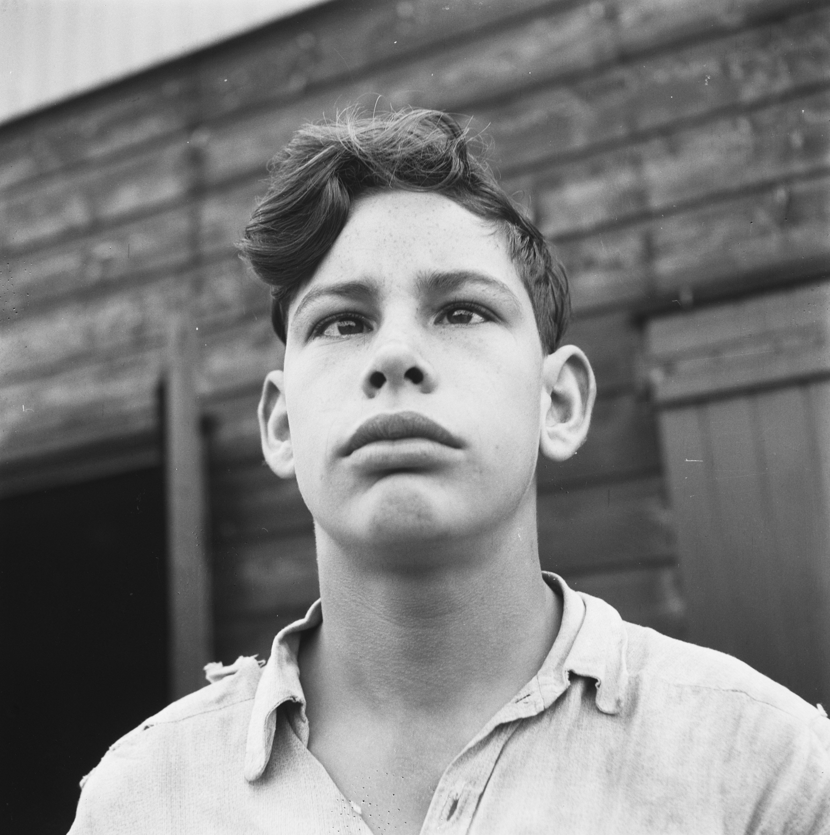 Collectie / Archief : Fotocollectie Anefo Reportage / Serie : Het werk van de Stichting Oorlogs Pleegkinderen op het gebied van de verzorging van kinderen van N.S.B.-ers Beschrijving : Portret van een scheel kijkende jongen Datum : oktober 1945 Trefwoorden : opvoeding, tweede wereldoorlog Fotograaf : Breijer, Charles / Anefo Auteursrechthebbende : Nationaal Archief Materiaalsoort : Negatief (zwart/wit) Nummer archiefinventaris : bekijk toegang 2.24.01.03 Bestanddeelnummer : 900-9438